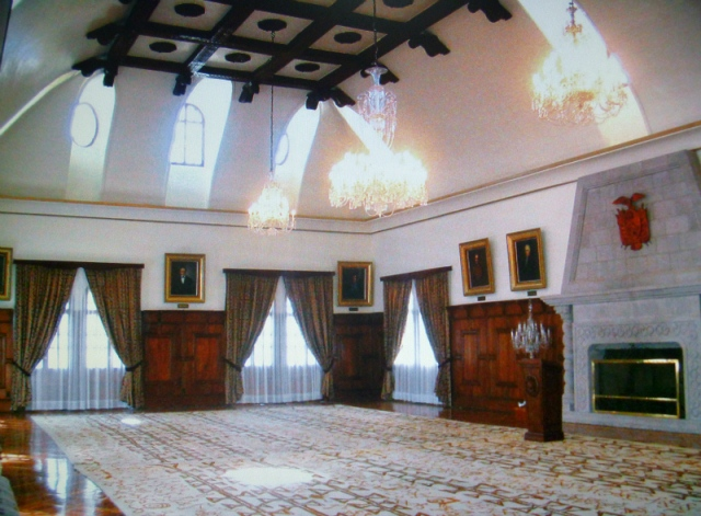 Salón de los Próceres, en el ala sur del Palacio de Najas, Quito (Ecuador).